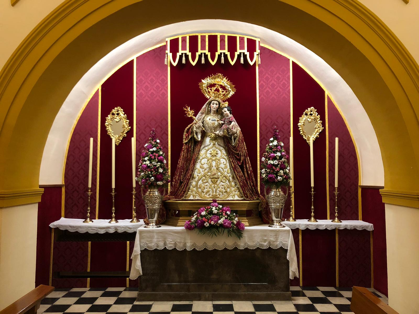 Vista interior de la Ermita de San Isidro (Granada). Capilla de Nuestra Señora de la Granada